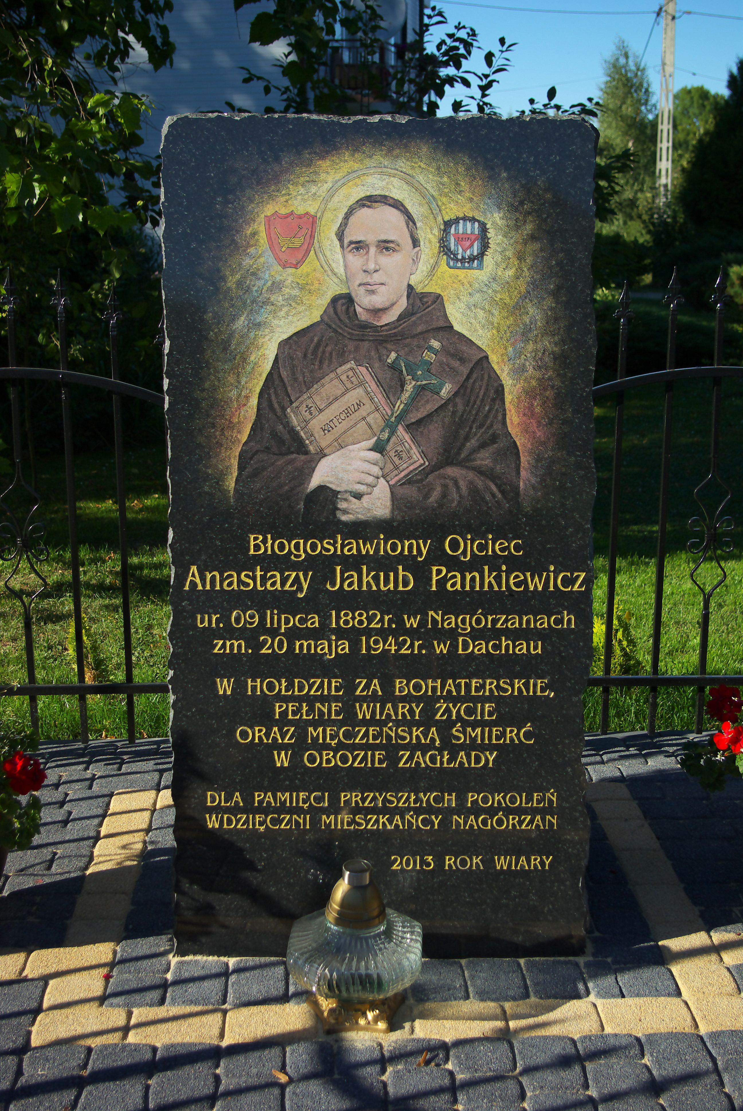 Tablica upamiętniająca św. Anastazego Pankiewicza w Nagórzanach.